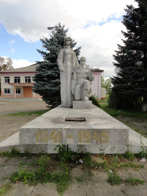 Памятник воинам-освободителям советской армии в селе Лисятичи (укр. Лисятичі) в Стрыйском районе Львовской области Украины.